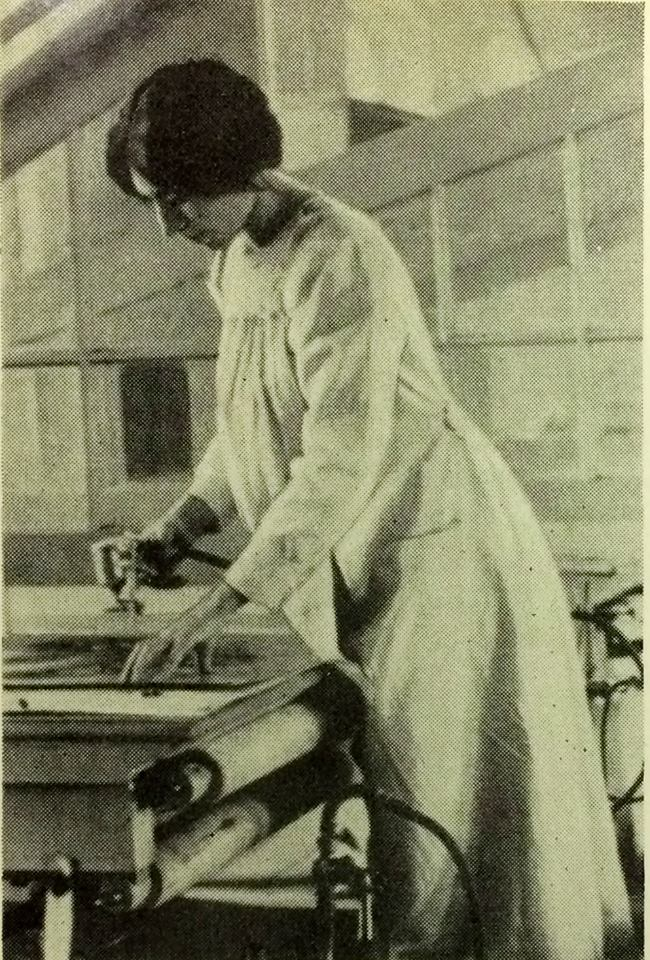 Фотография Людмилы Маяковской